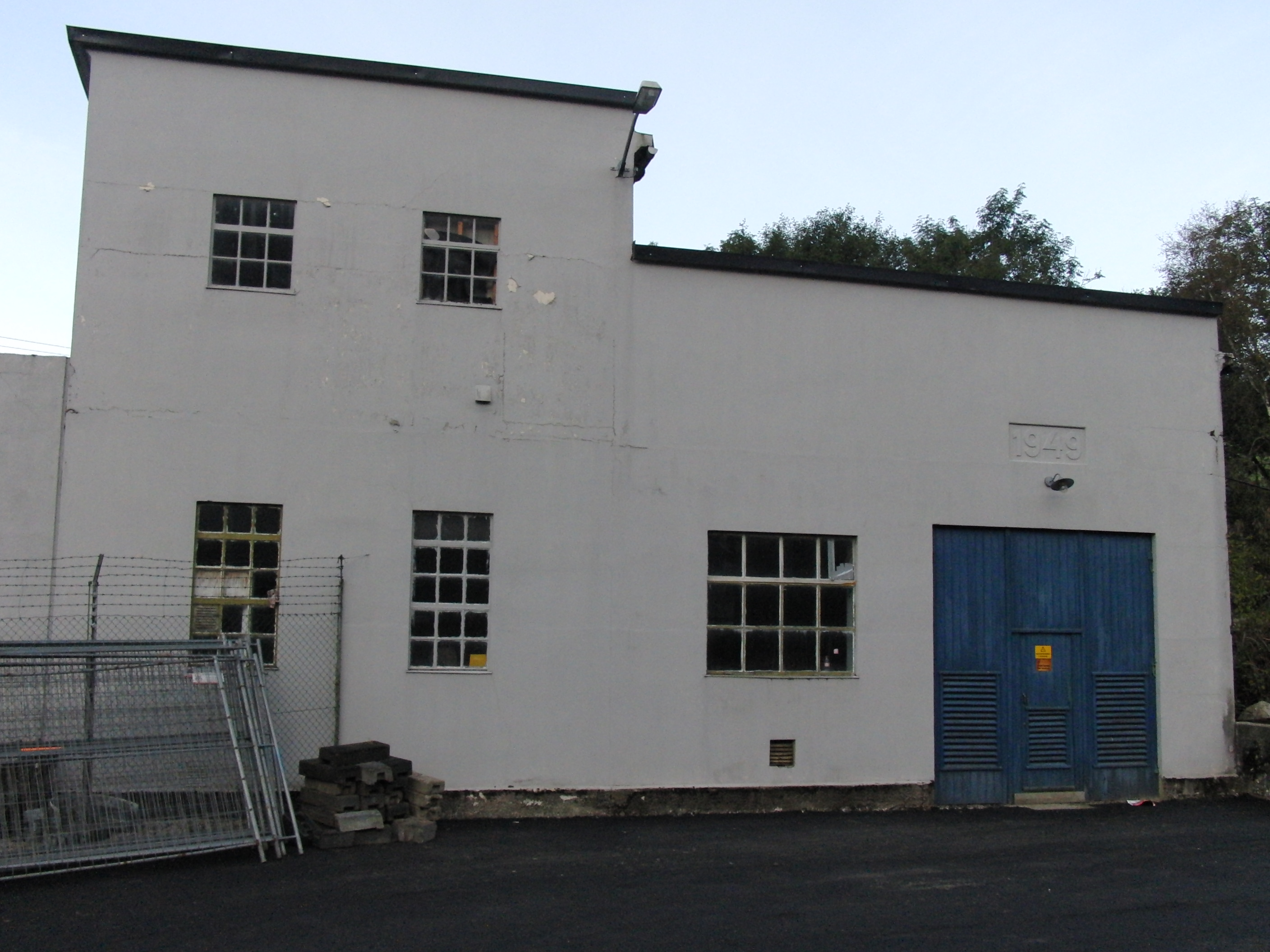 Haukland gamle kraftverk